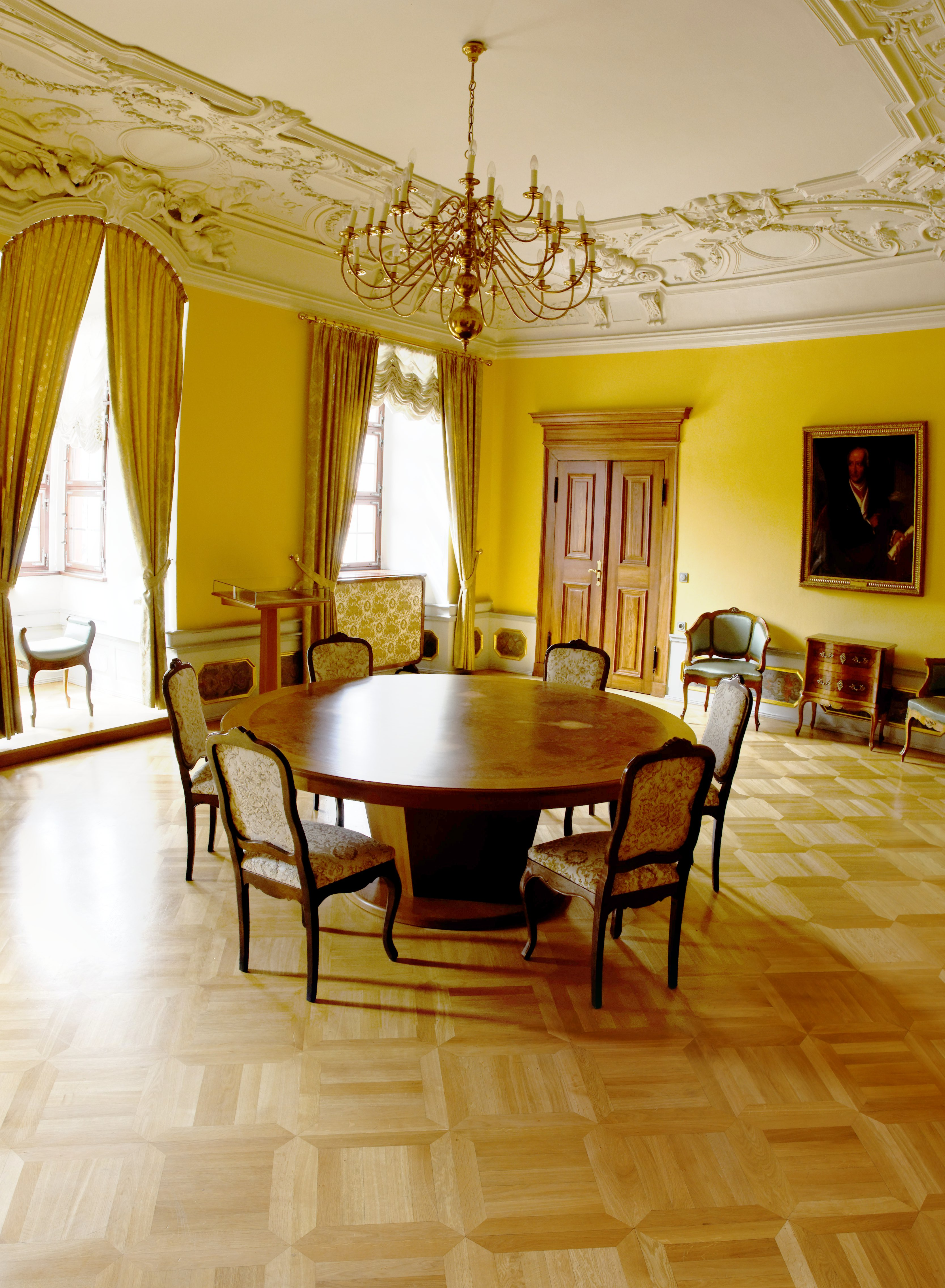 Thüringer Staatskanzlei - Innen